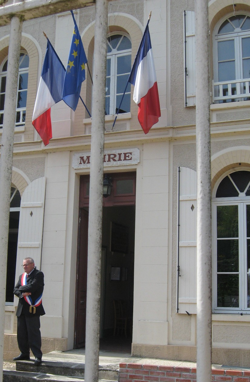 Maire de la commune française d'Amenucourt (Seine-et-Oise), devant la façade de l'Hôtel de ville.